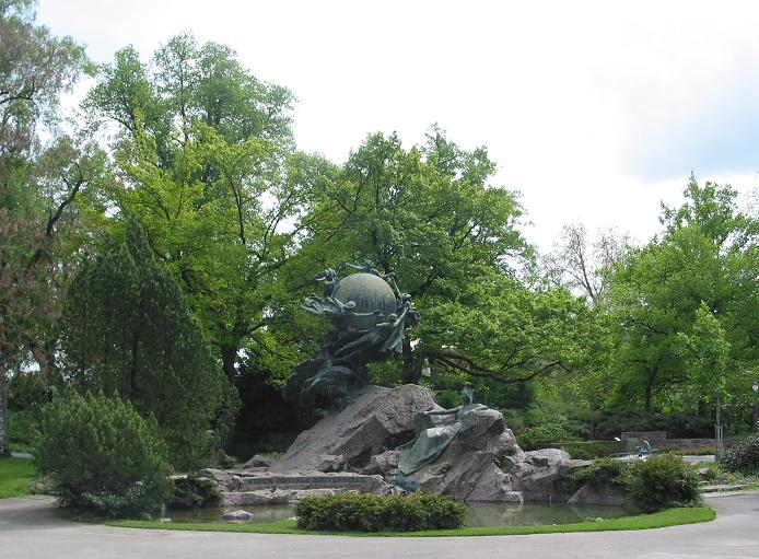 Denkmal der Weltpostverein in Bern. Monument de l'Union Postal Universelle à Berne. Monumento de la Unión Postal Universal en Berna. Make by me in 2005